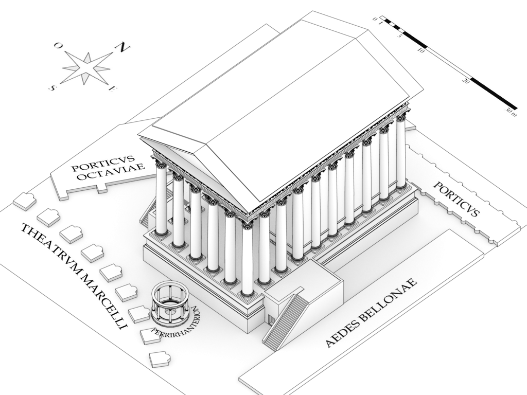 Restitution du temple d'Apollon Sosianus D'après : - Richardson, A New Topographical Dictionary of Ancient Rome, 1992 - Di Mauro, « Il tempio di Apollo Medico a Roma, croce degli archeologi », BTA, n°301, juin 2002 - De Chaisemartin, Rome. Paysage urbain et idéologie : Des Scipions à Hadrien, 2003 - Vitti, « Note di topografia sull’area del Teatro di Marcello », MEFRA, n°122, 2010 - Stamper, The architecture of roman temples : the Republic to the middle Empire, 2005 Perspective isométrique Voir aussi